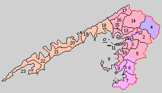 愛媛県西宇和郡の町村制時点の町村。